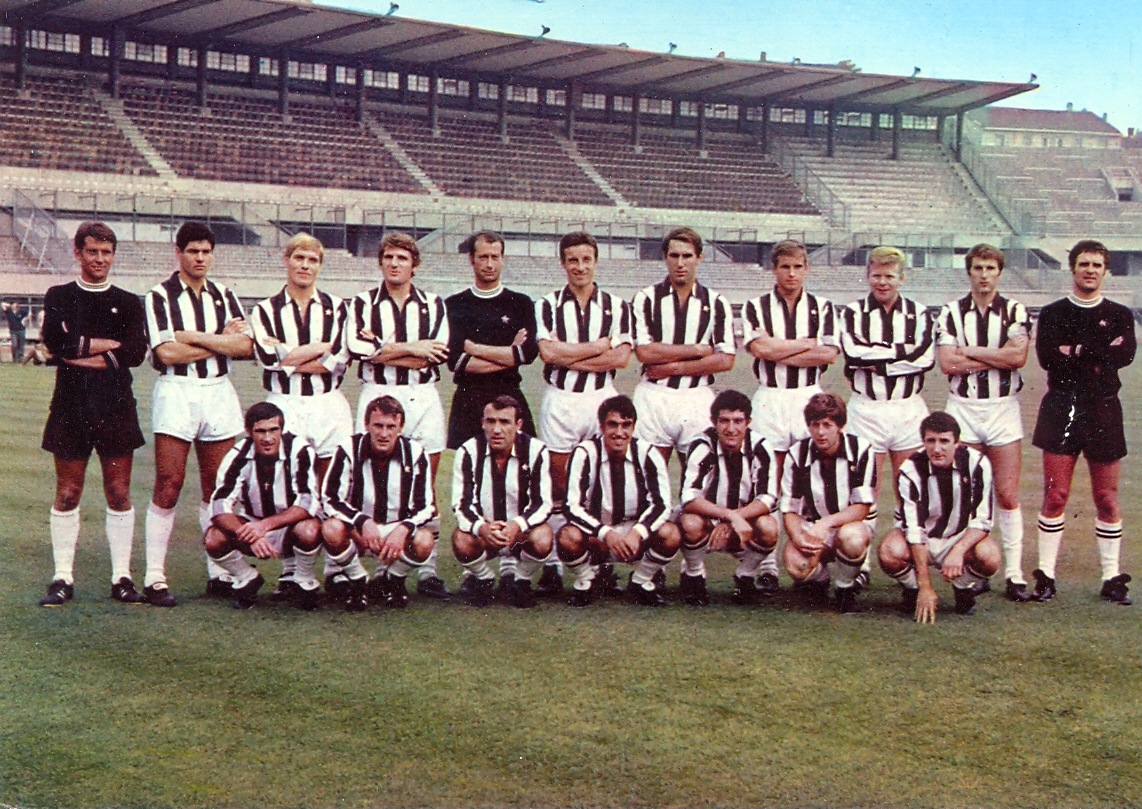 La rosa della Juventus F.C. all'inizio della stagione 1968-69, in posa all'interno dello stadio Comunale di Torino (Italia). Da sinistra, in piedi: R. Anzolin, S. Salvadore, R. Benetti, G. Leoncini, G. Sarti, E. Castano (capitano), G. Bercellino (I), G. Roveta, H. Haller, G. Zigoni, R. Tancredi; accosciati: L. Pasetti, G. Colausig, L. del Sol, P. Anastasi, E. Favalli, G. Sacco, G. Menichelli.